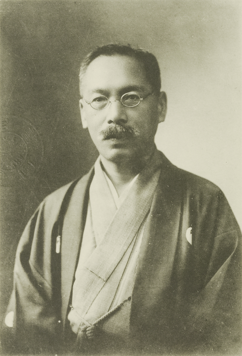 Portrait of Tsuruhara Sadakichi (鶴原定吉, 1857 – 1914)